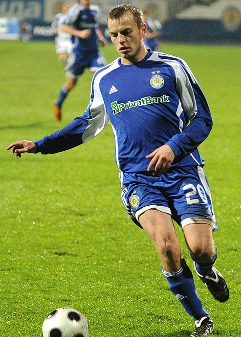 Олег Анатольевич Гусев - украинский футболист.